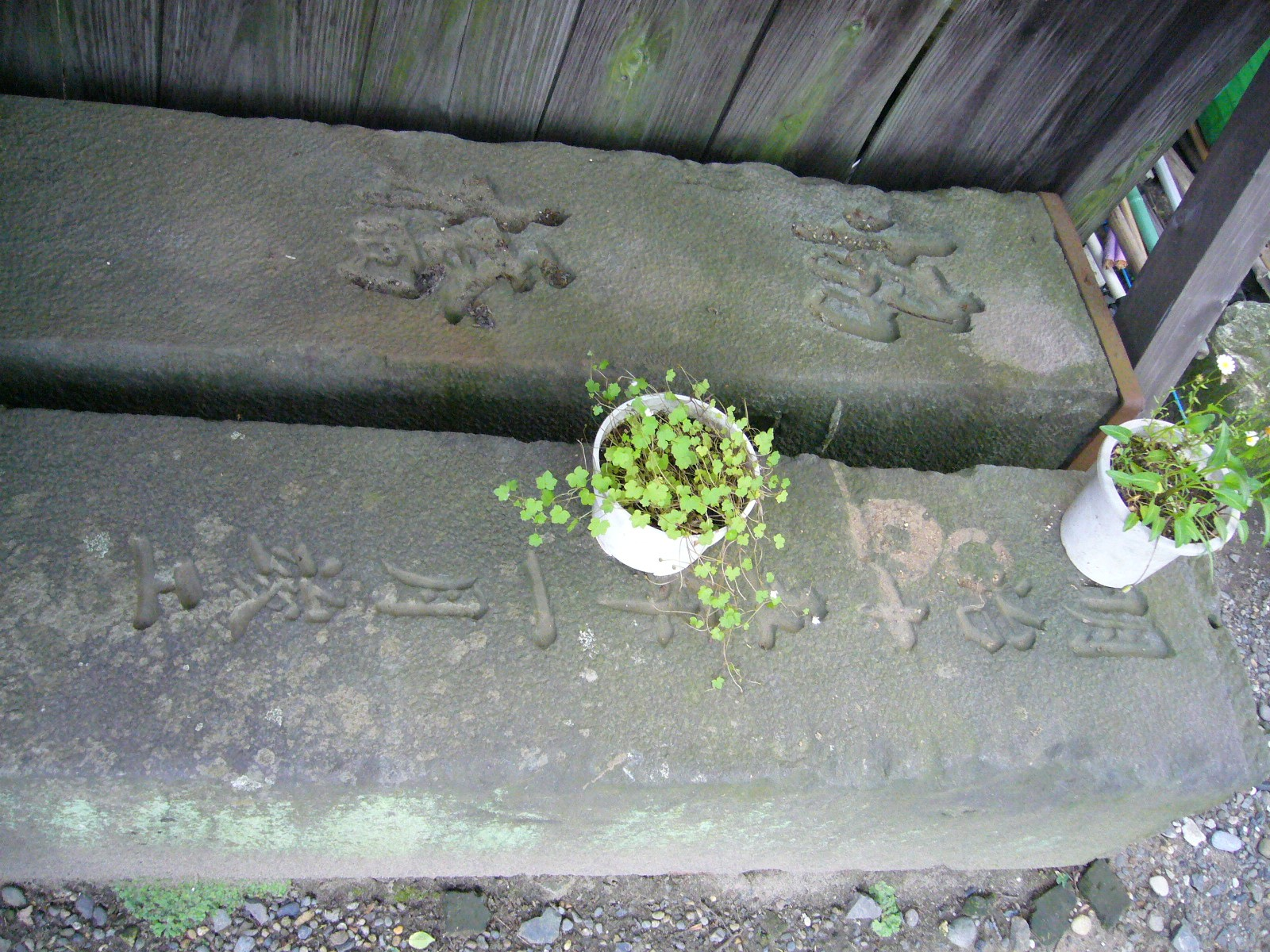 kanae-bridge-main-pillar,katori-city,japan